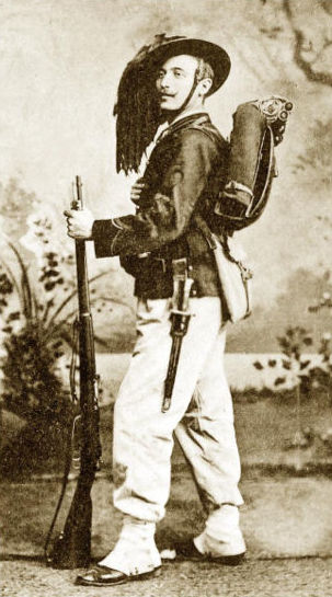 Bersaglieri in 1900 bersaglier